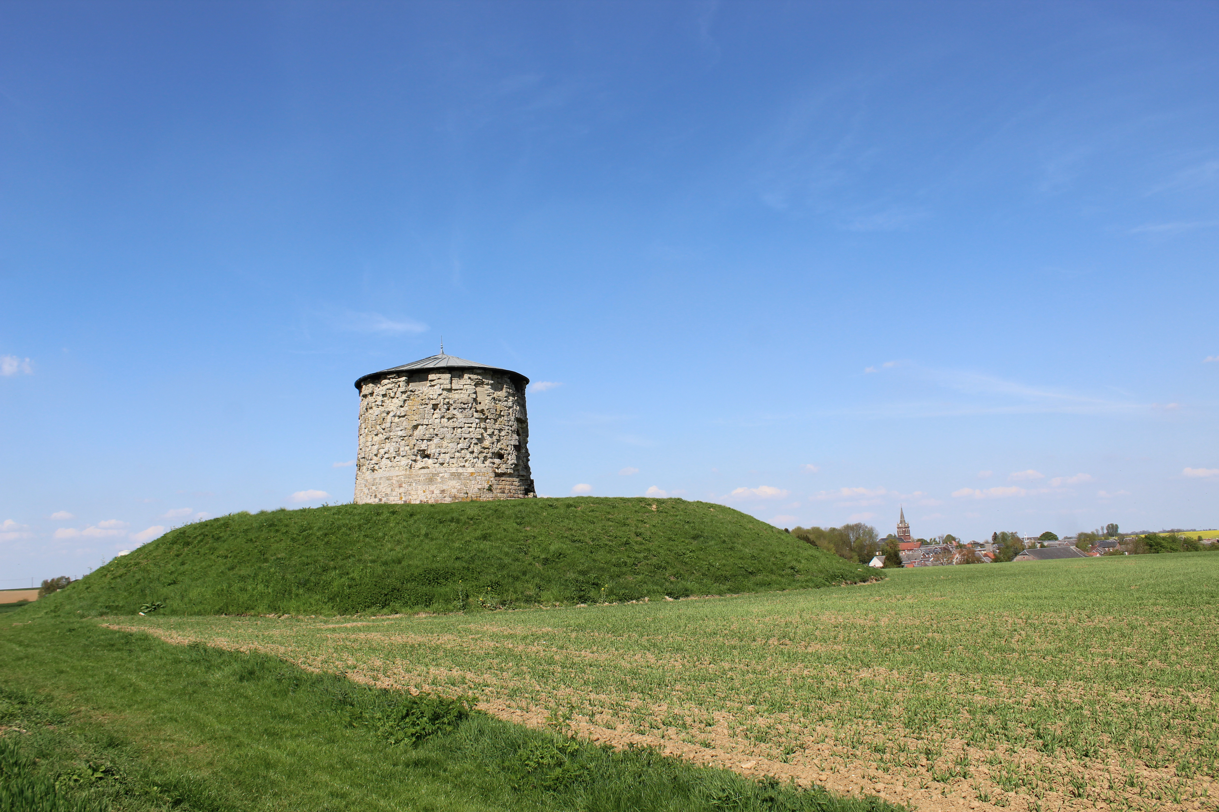 La tour de gué